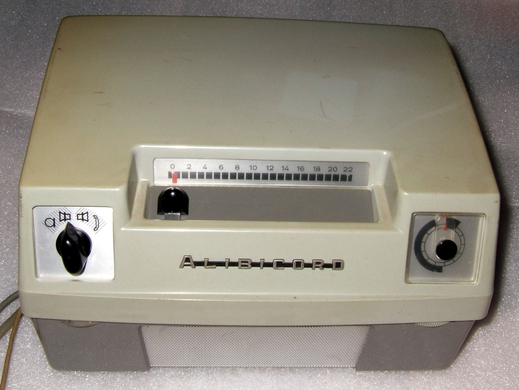 Répondeur enregistreur téléphonique électromécanique à disque et tambour magnétique.